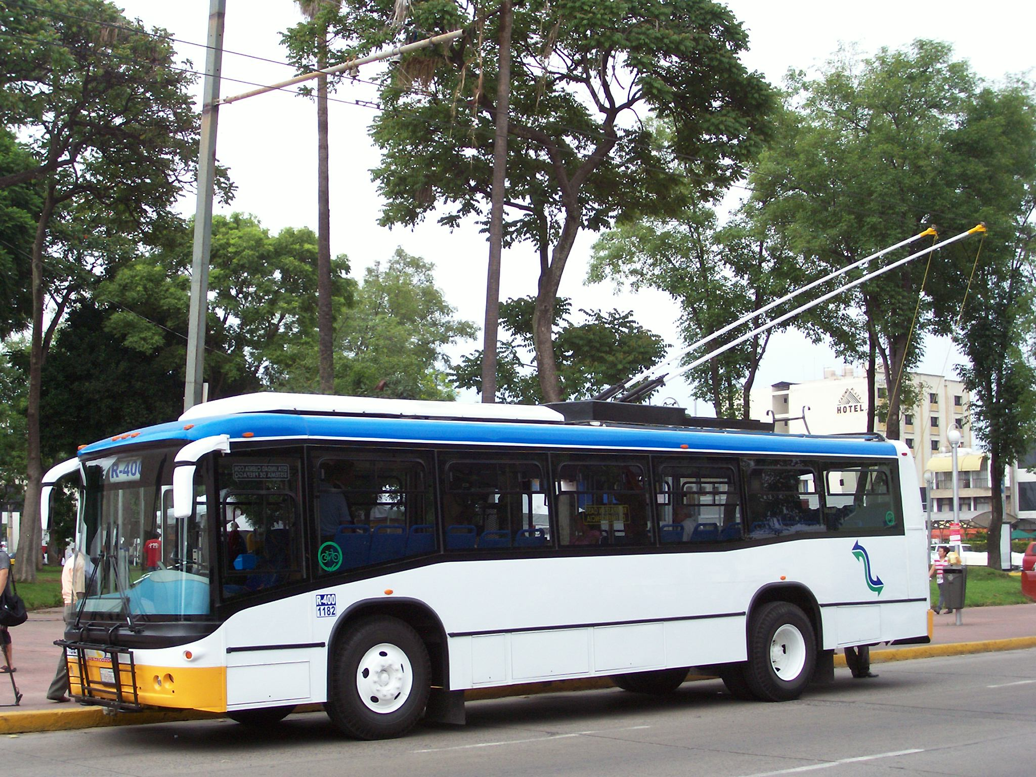 Trolebus reconstruido de la ciudad de Guadalajara, Jalisco